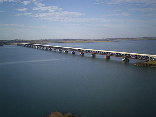 Ponte Rodoferroviário sobre o Rio Paraná, entre os estados do Mato Grosso do Sul e São Paulo. Possui 2.600 metros de comprimento.